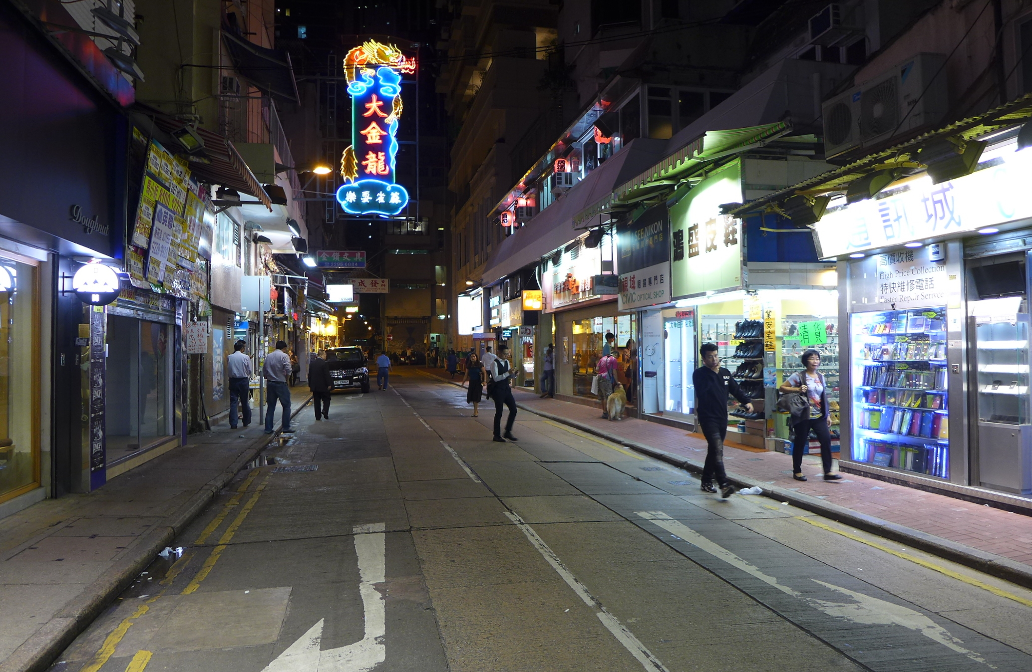 Spring Garden Line Night view